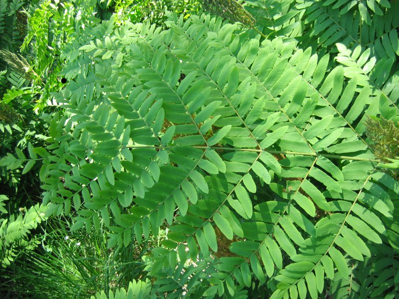 Königsfarn Osmunda regalis, Zingst